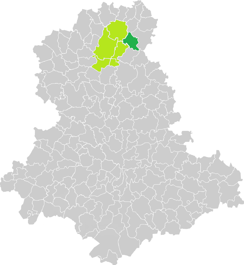 Carte de situation de la commune de Saint-Hilaire-la-Treille (en vert foncé) dans le votre Canton (en vert clair) sur une carte des communes de la Haute-Vienne